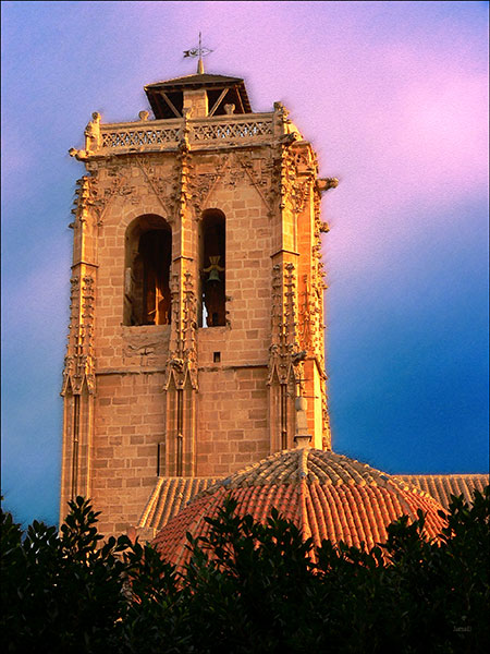 Iglesia Santas Justa y Rufina de Orihuela